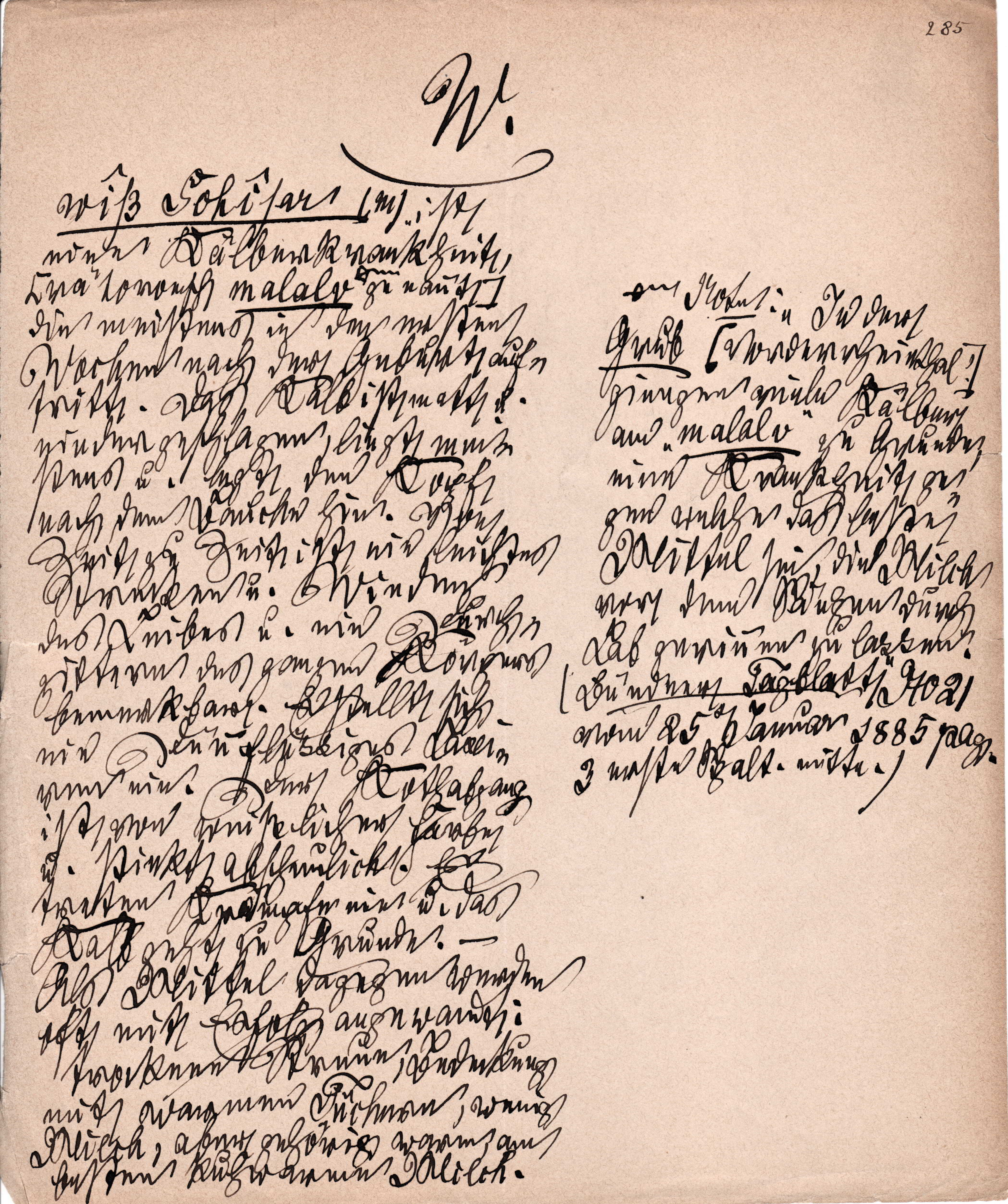 Handschriftlicher Nachtrag zu Valentin Bühlers Davoser Wörterbuch, wohl Ende 19. Jahrhundert, Archiv des Schweizerischen Idiotikons, Zürich.